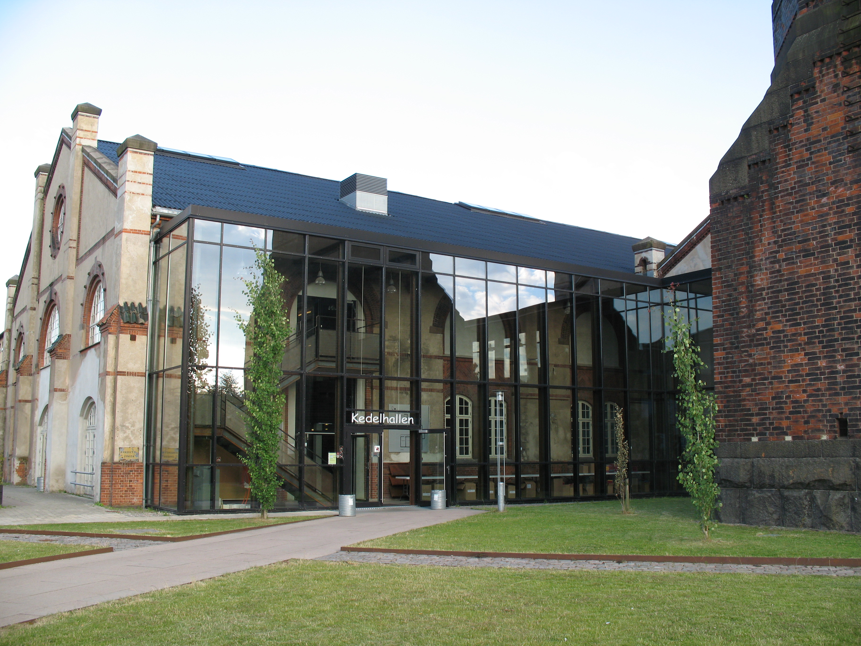 Kedelhallen, formerly Frederiksberg Gorbrændingsanstalt, in Frederiksberg, Copenhagen, Denmark